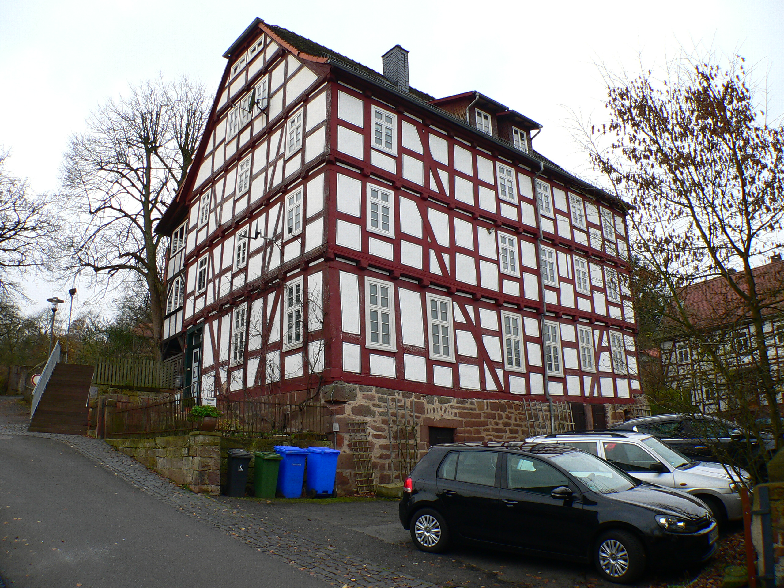 Burg Rauschenberg (Metropolitanei) in Rauschenberg, Hessen, Deutschland